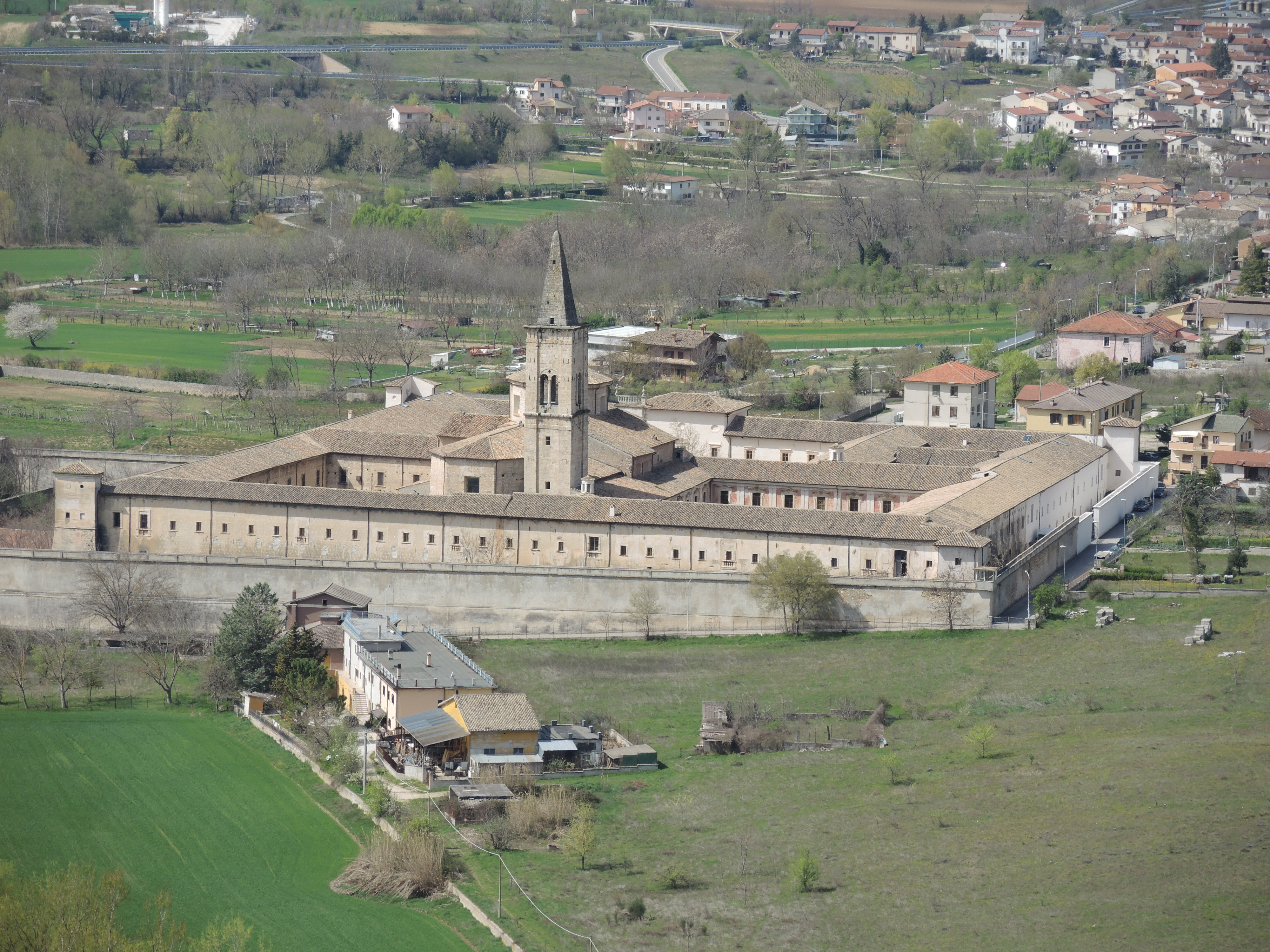 Sulmona: Abbazia di Santo Spirito al Morrone